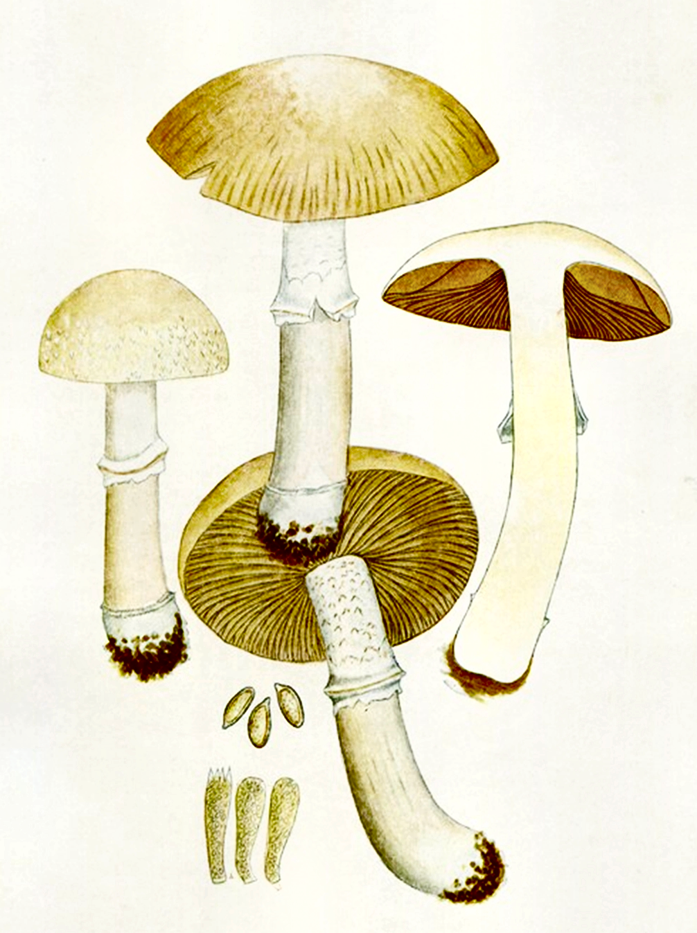 Giacomo Bresadola: Pholiota caperata (syn. of Cortinarius caperatus, Rozizes caperata), 1930